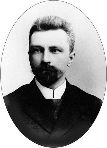 Грунский, Николай Кузьмич